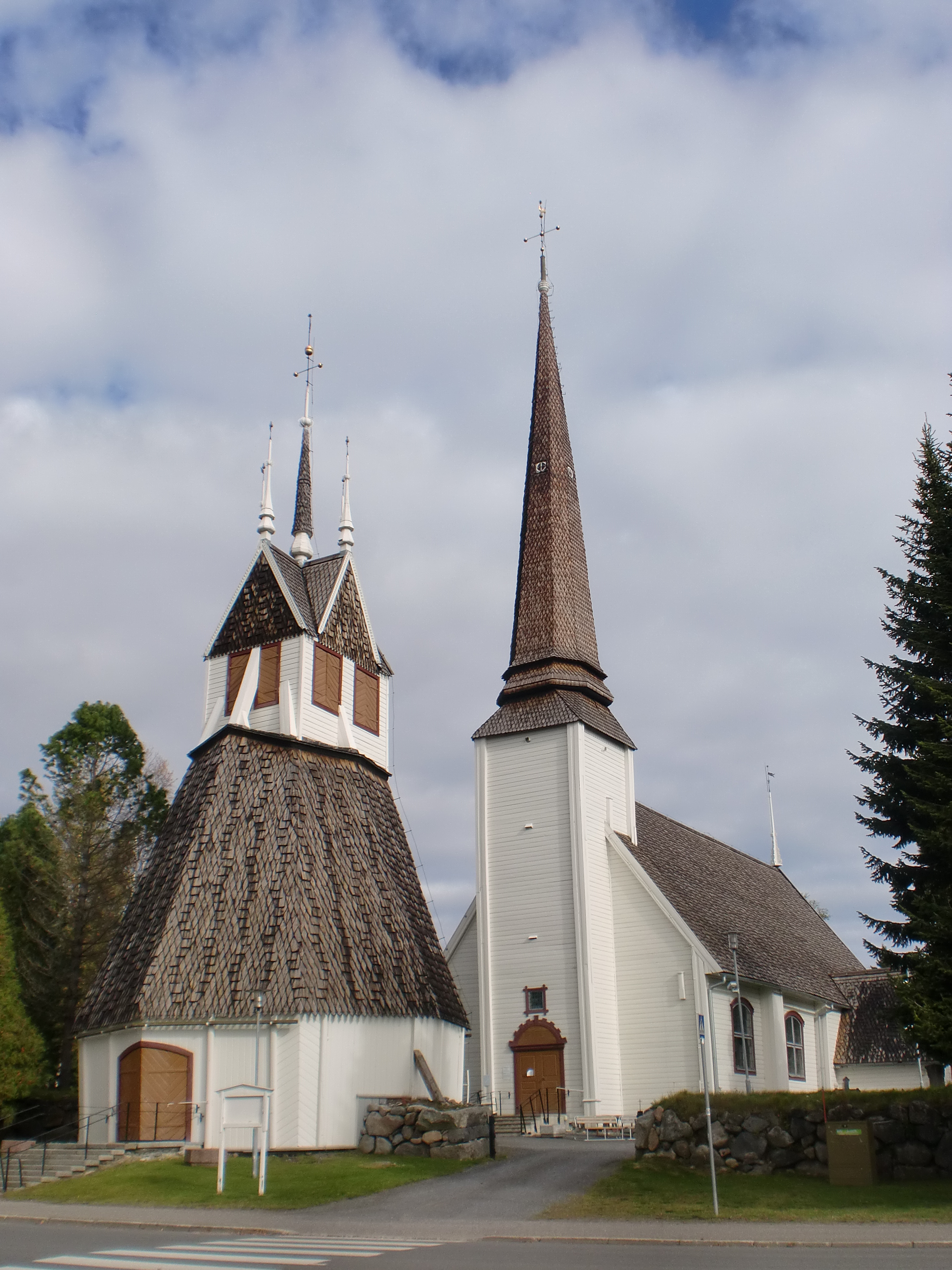 Tornion kirkko; kirkkomaisema Torniossa This is a photo of a monument in Finland identified by the ID 'Tornio Church' (Q1742952)